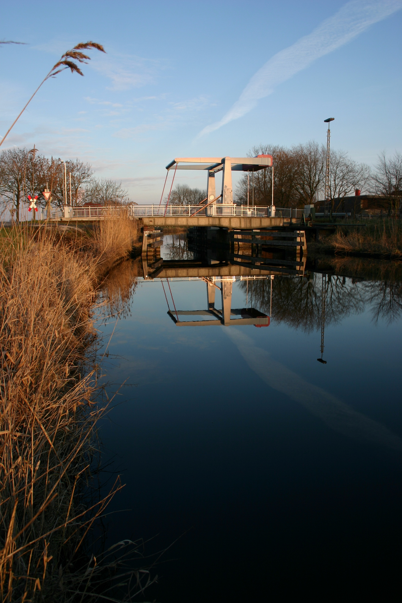 Ems-Jade-Kanal near Sande (Friesland).